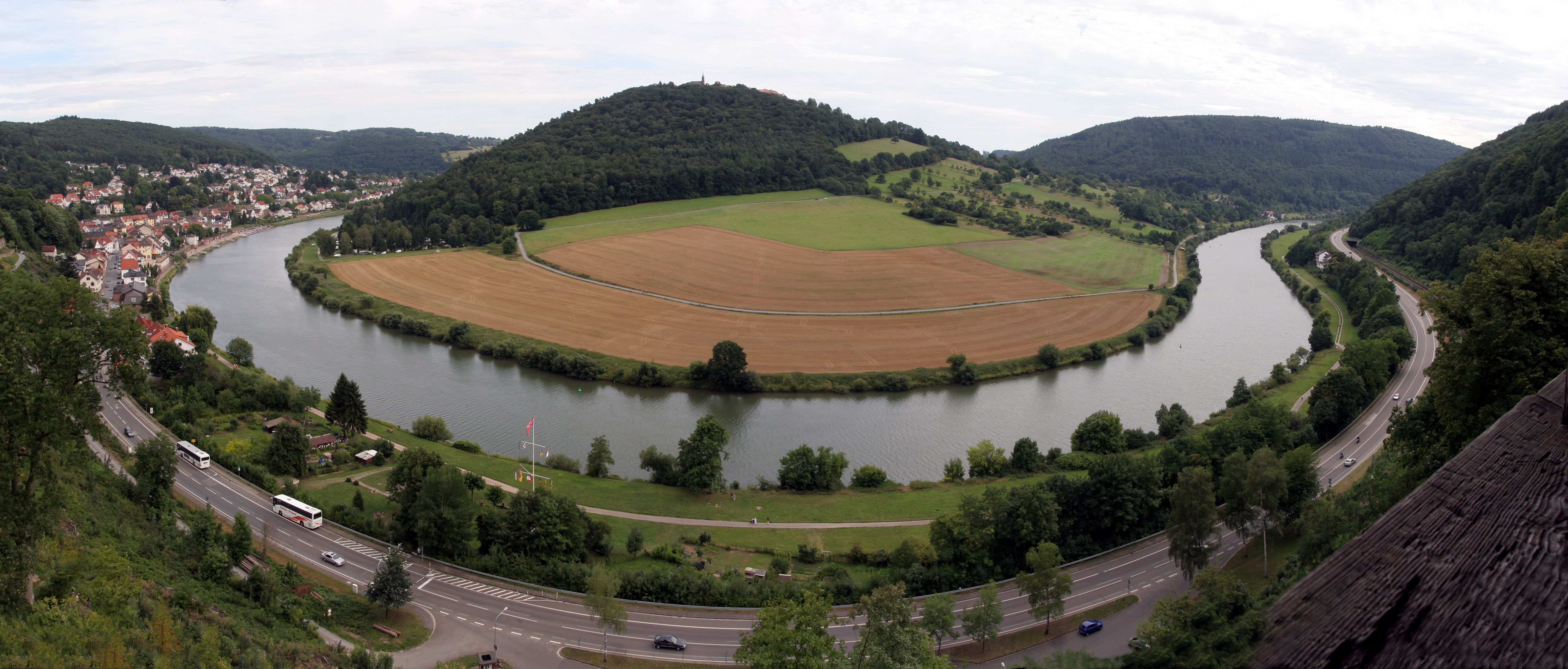 Das Neckartal von der Hinterburg bei Neckarsteinach aus fotografiert. Gegenüber der Dilsberg mit der Bergfeste Dilsberg. Zusammengesetzt aus drei Einzelaufnahmen mit Hugin. f 17mm; 1:8,0; 1/320s; ISO 200